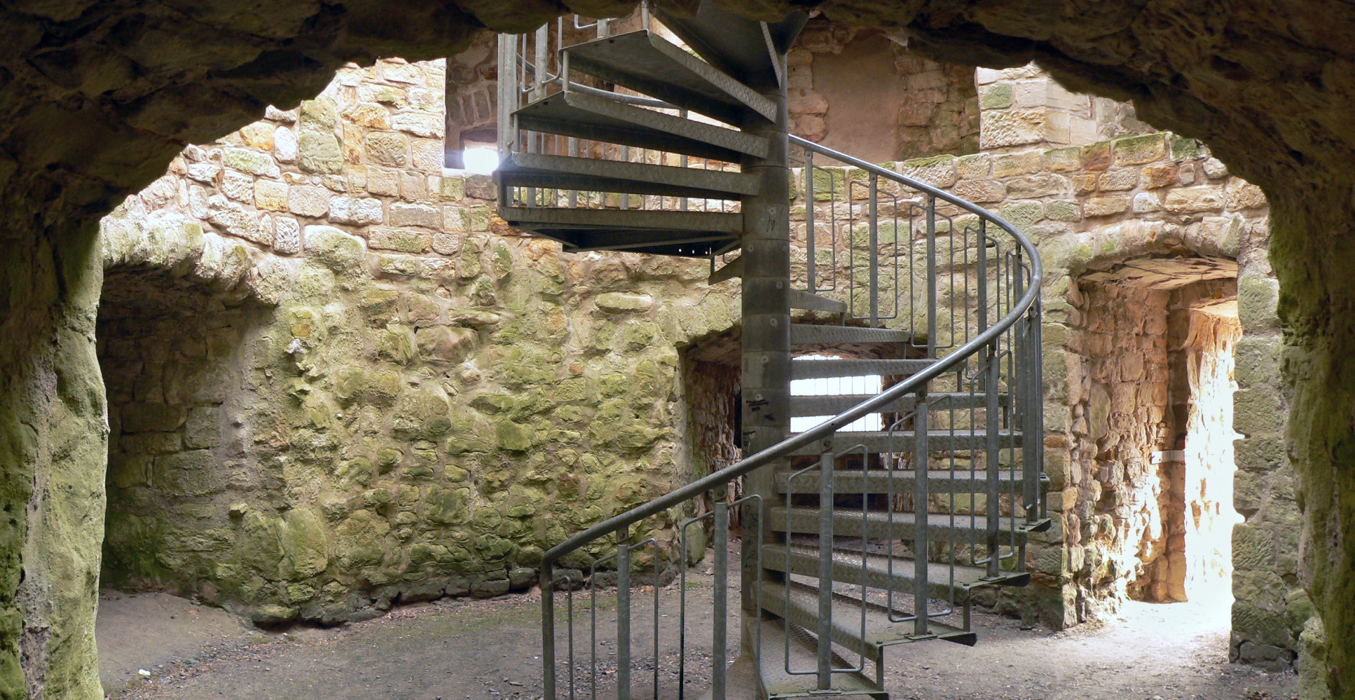 Burg Liebenburg, Hausmannsturm von innen